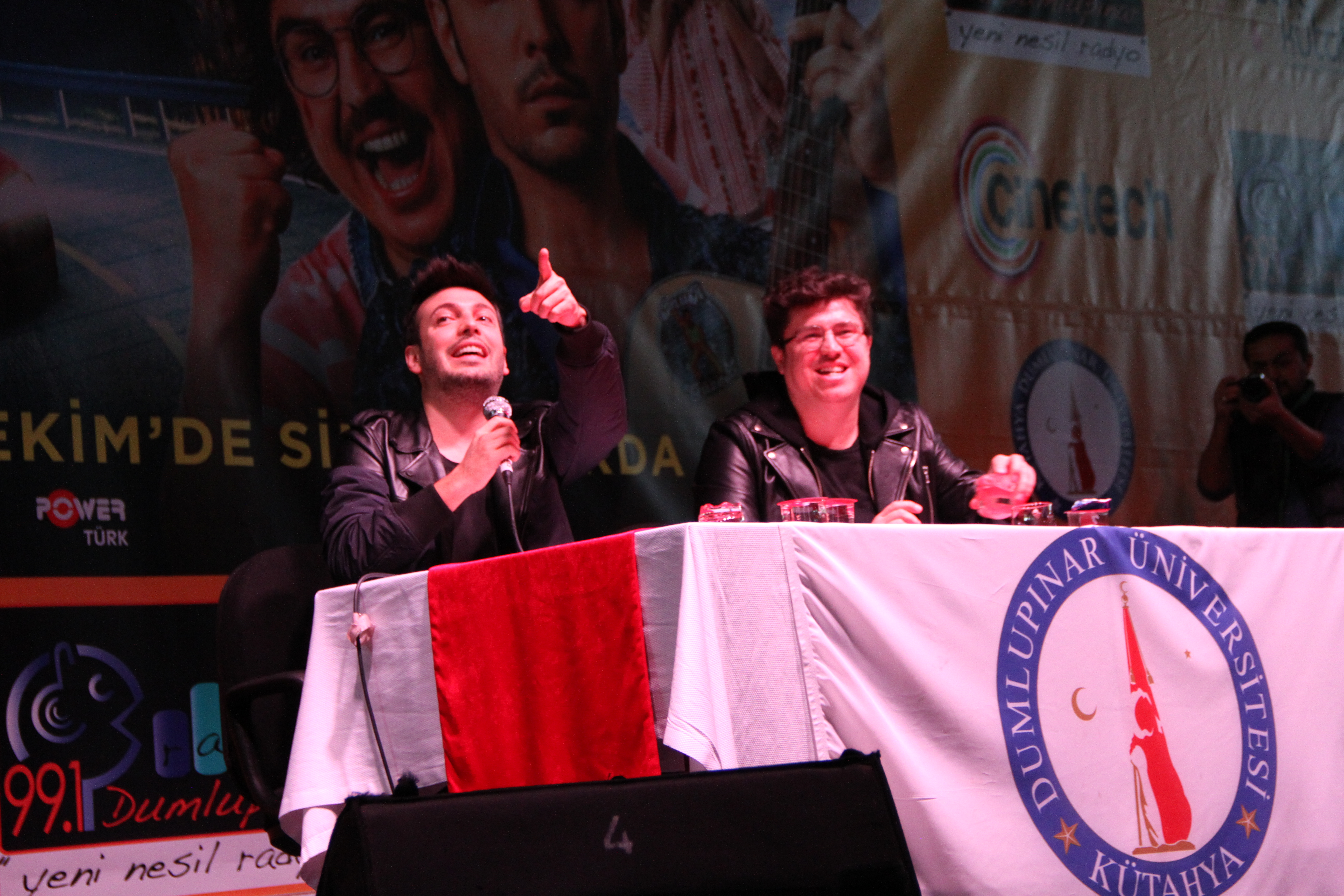 İbrahim Büyükak ve Oğuzhan Koç, Kütahya Dumlupınar Üniversitesinde katıldıkları bir söyleşide